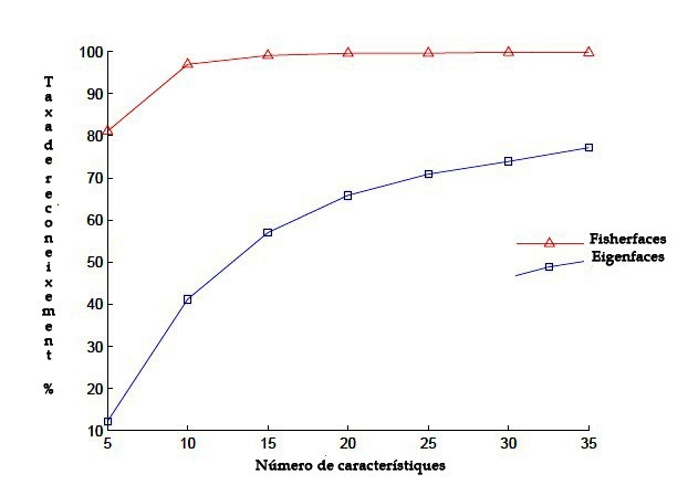 Comparació en funció del número de característiques en la Il·luminació